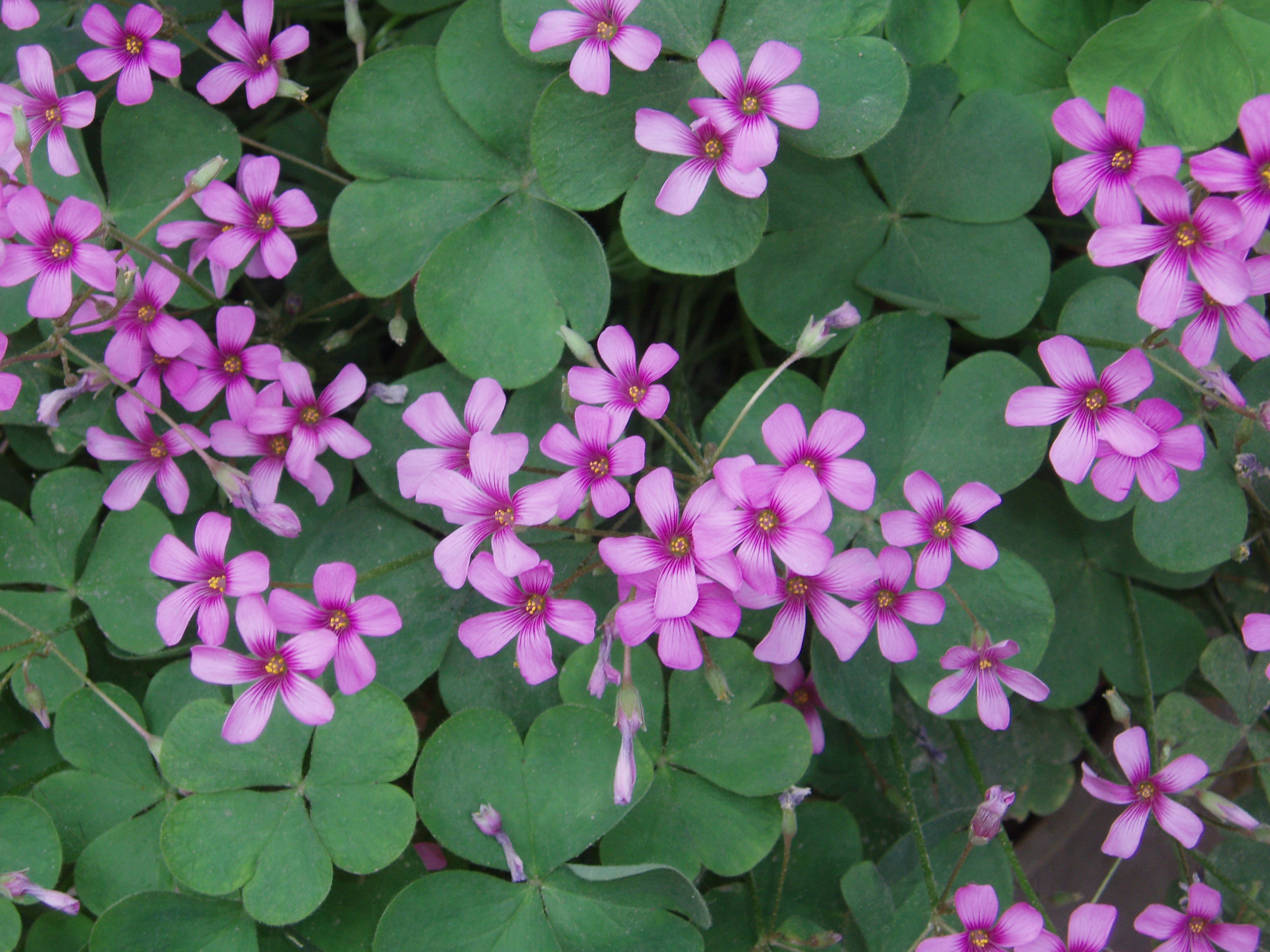 Oxalis corymbosa Lavender Sorrel